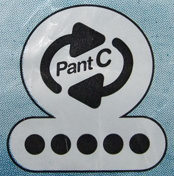 Pfandlogo C Dänemark